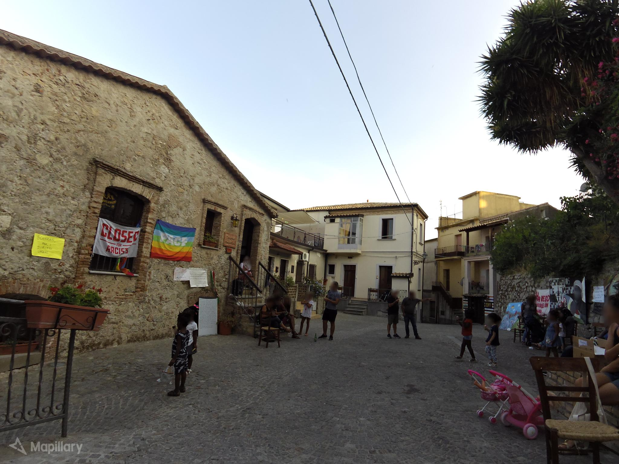 Villaggio globale a Riace (2018)